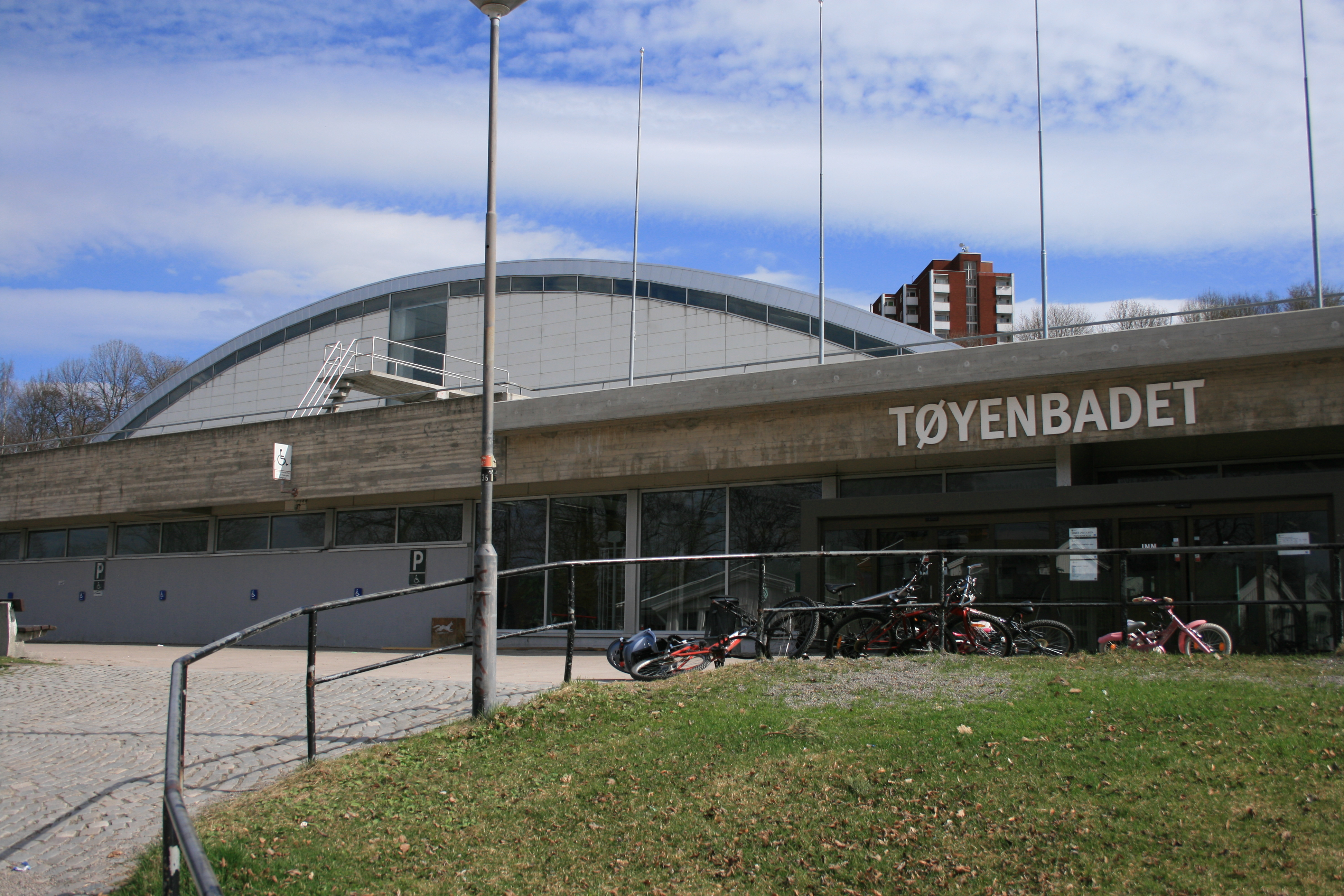 Tøyenbadet, Oslo